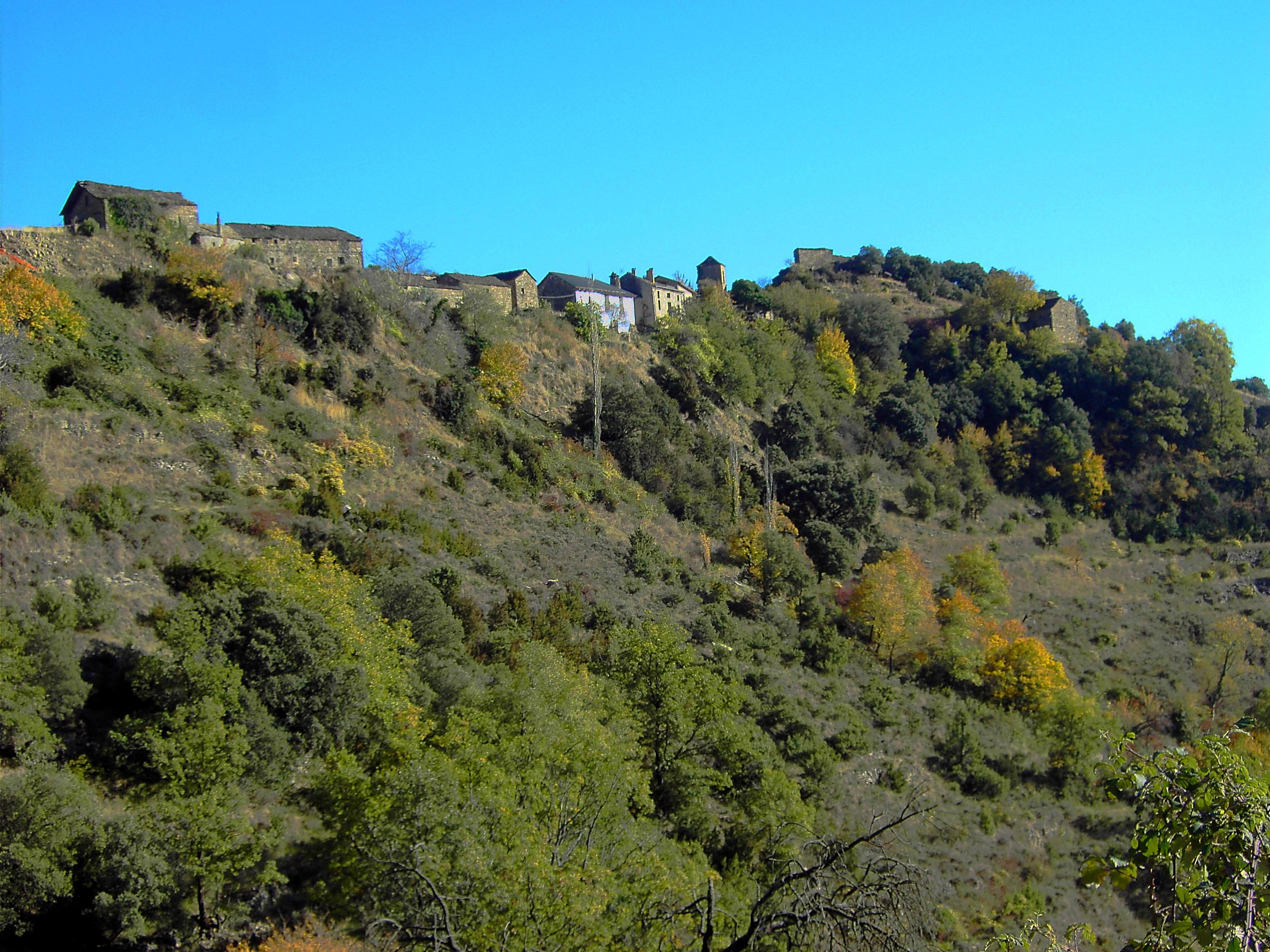 Vista general de Ascaso.